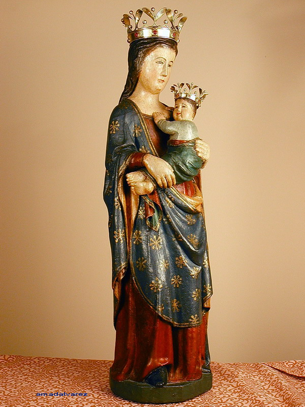 Imatge de la Mare de Déu de Puiggraciós. Santuari de Puiggraciós.(Vallès Oriental-Catalunya), s.XVIII.